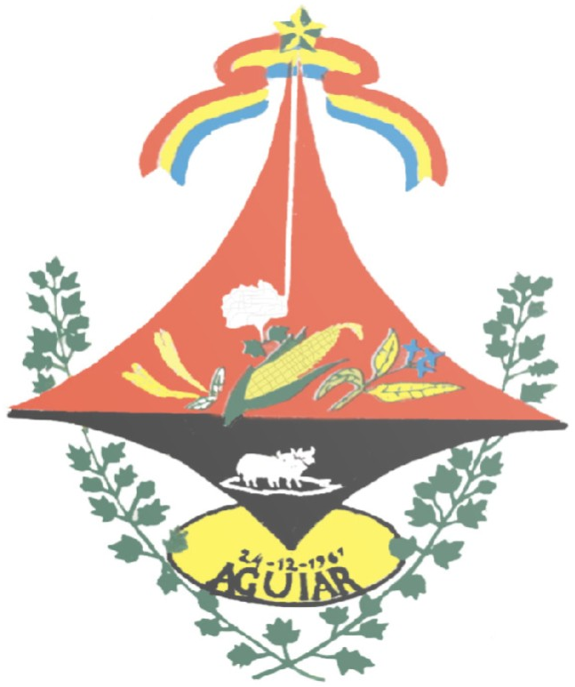 Brasão da cidade de Aguiar, Paraíba, Brasil